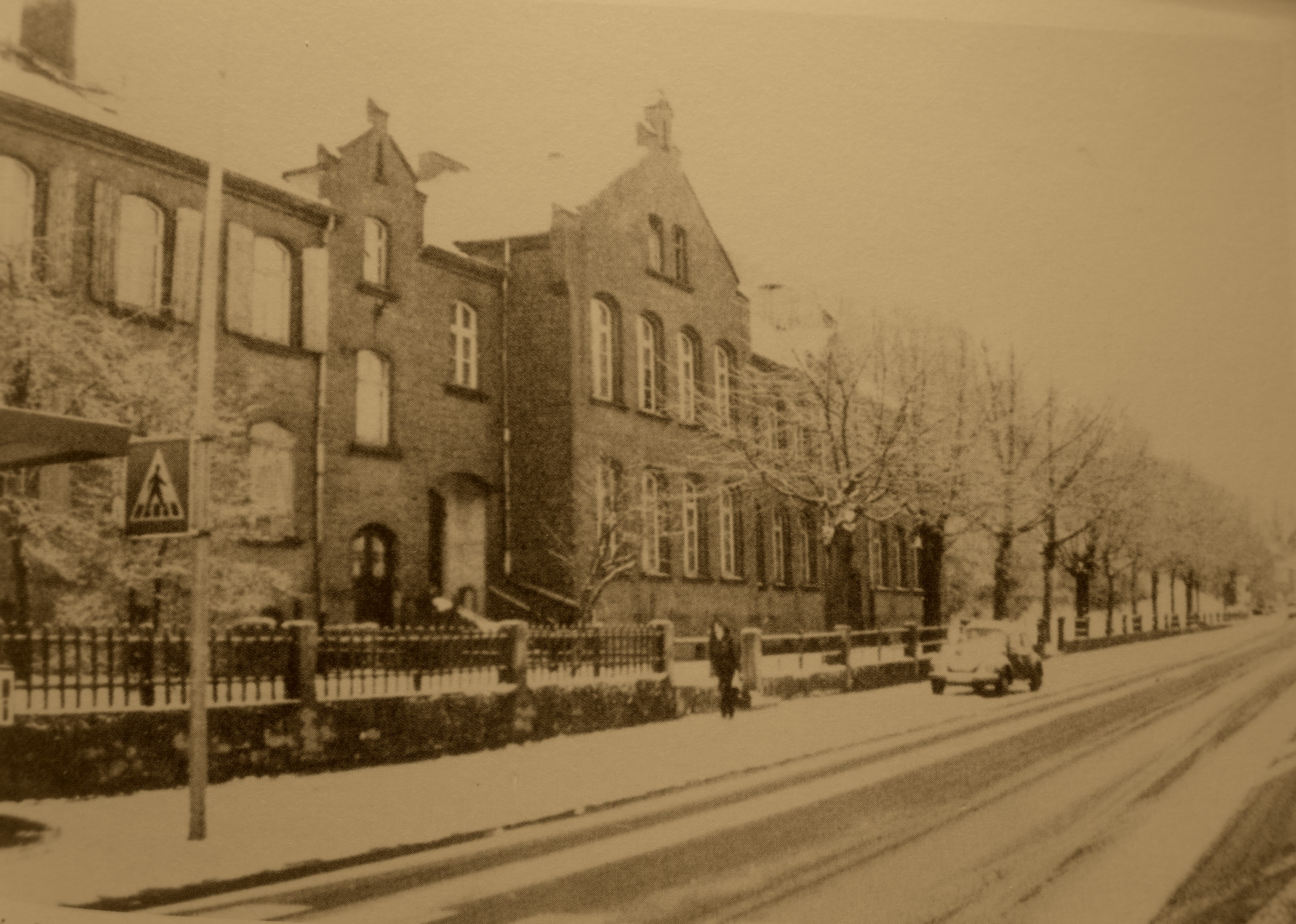 Diefflen, Volksschule in der Dillinger Straße, errichtet ab 1902, abgerissen zugunsten der im Jahr 1986 vollendeten Wohn- u. Hotelanlage "Bawelsberger Hof" (Stadtarchiv Dillingen/Saar)